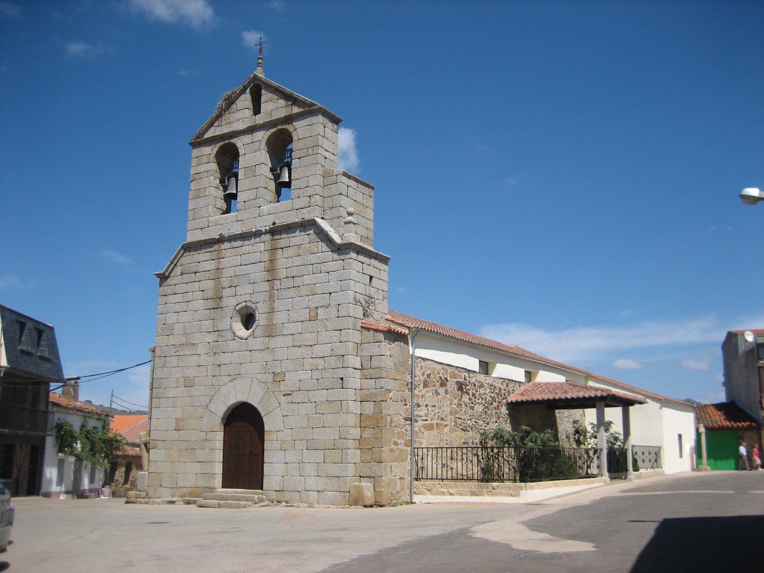 Iglesia de Cereceda de la Sierra (Salamanca, Castilla y León)